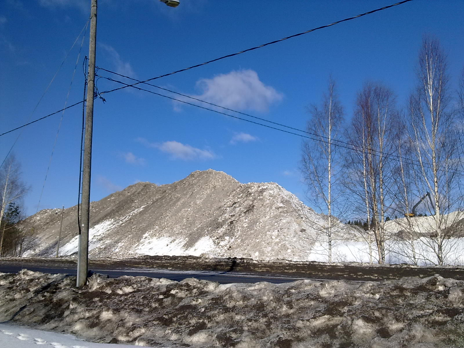 Turvesuon lumikasat maaliskuussa 2011